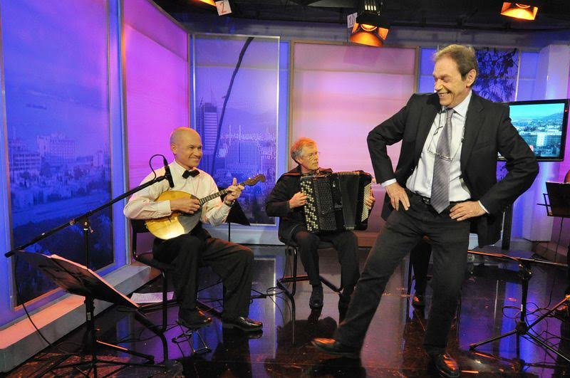 Arye Yass